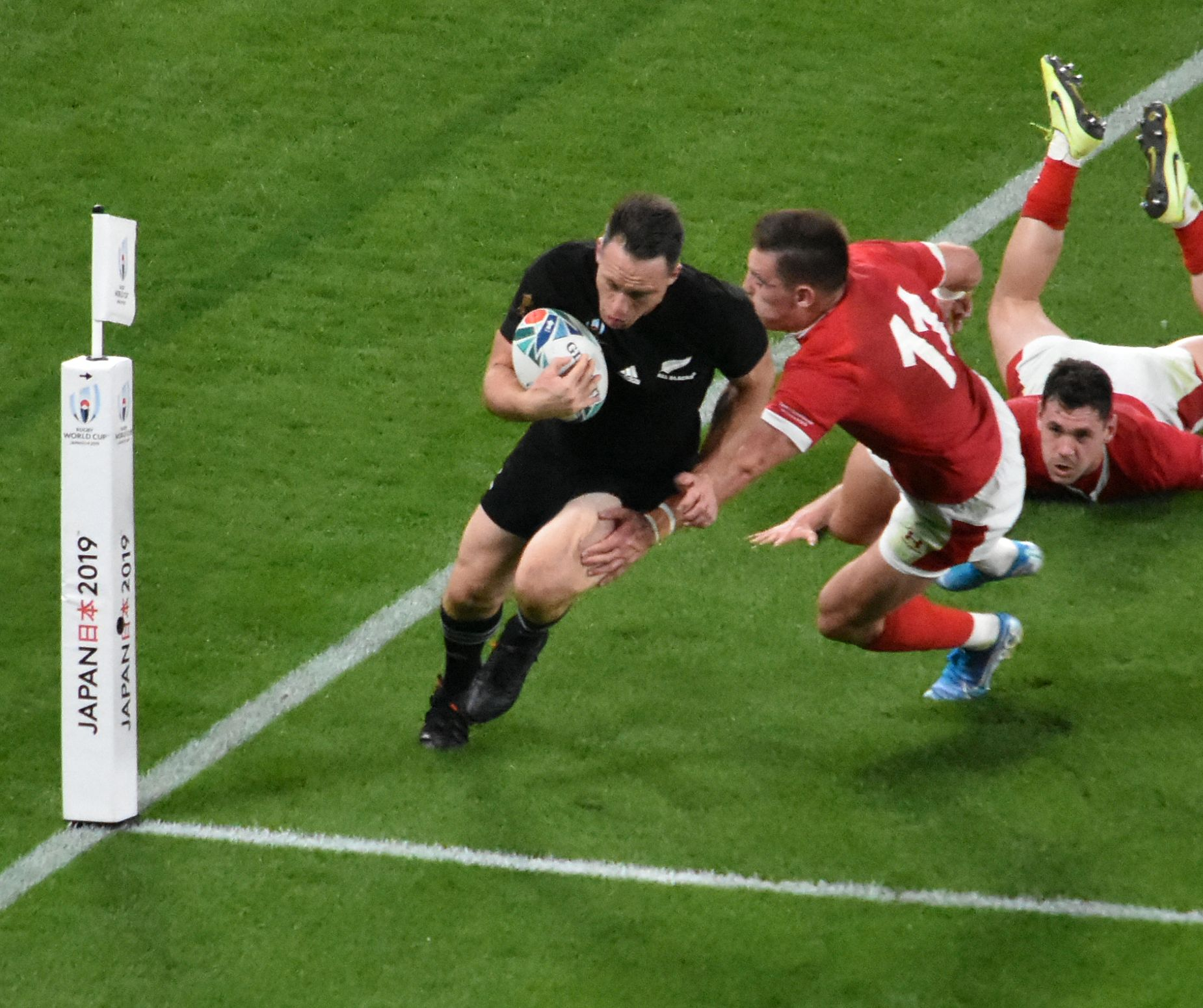 ラグビーニュージーランド代表